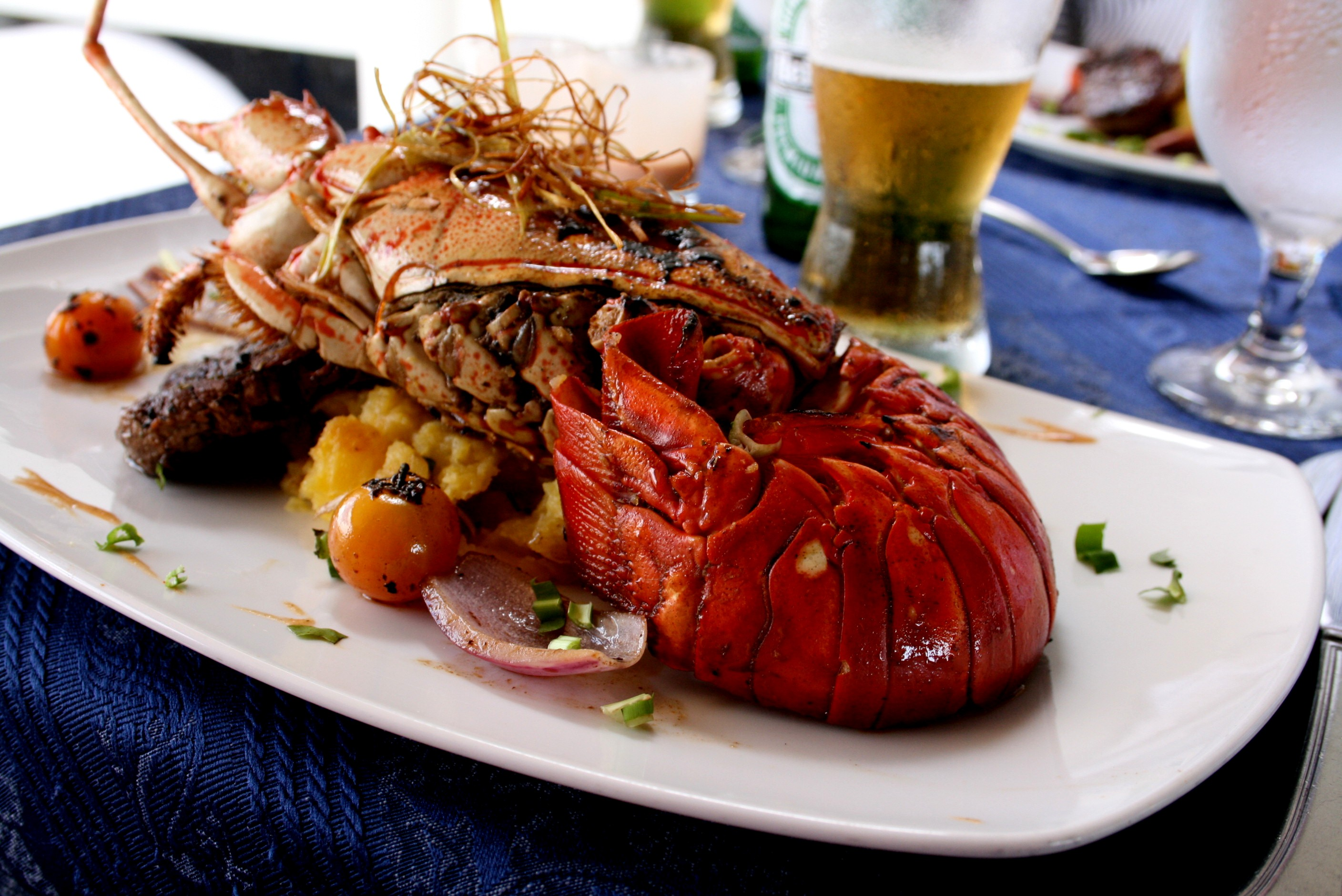 panama.langostasobrepapitacriolla Lobster Creole